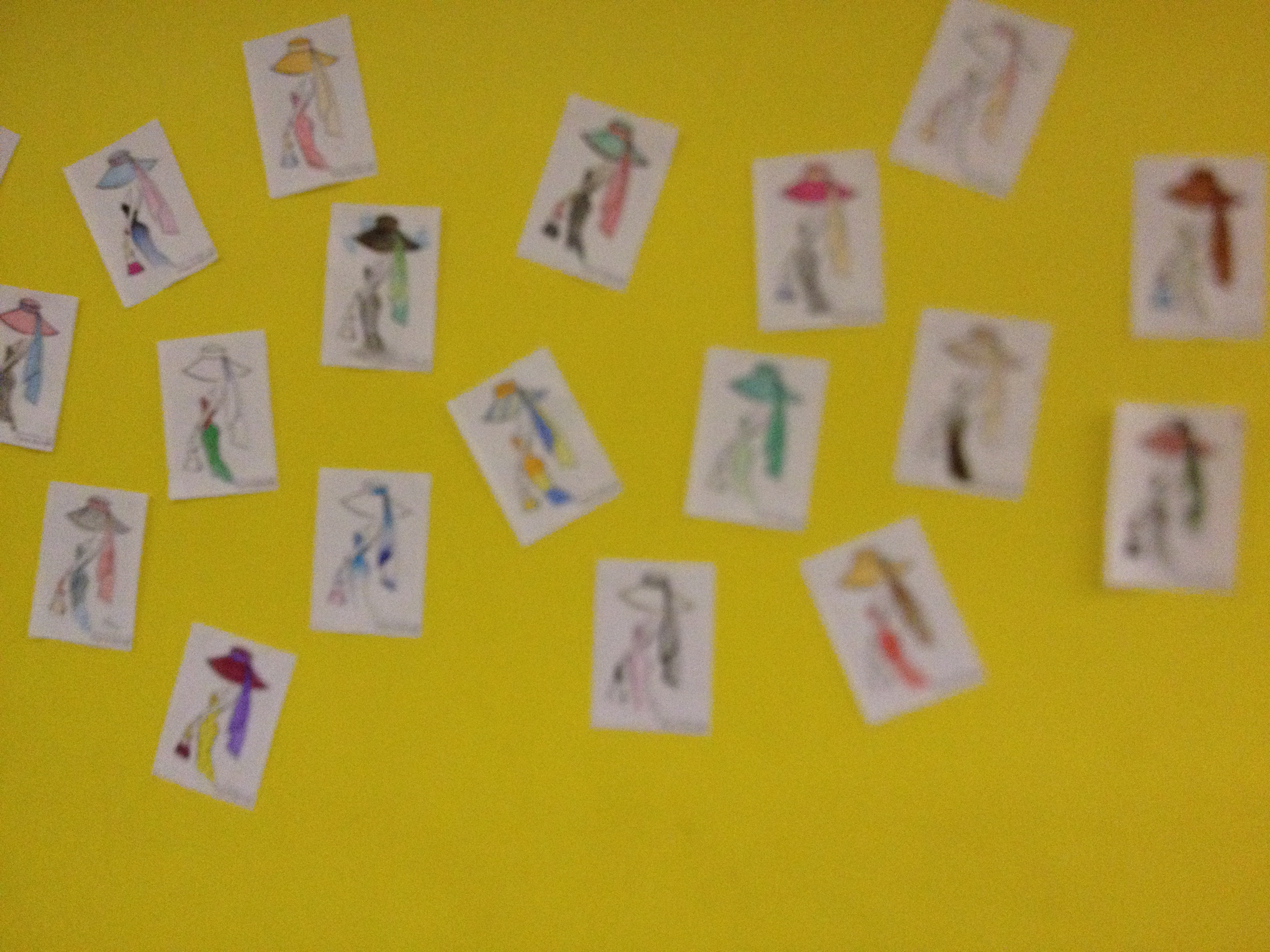 Exposição do curso Design de Moda pelos estudantes da Universidade Federal de Goiás